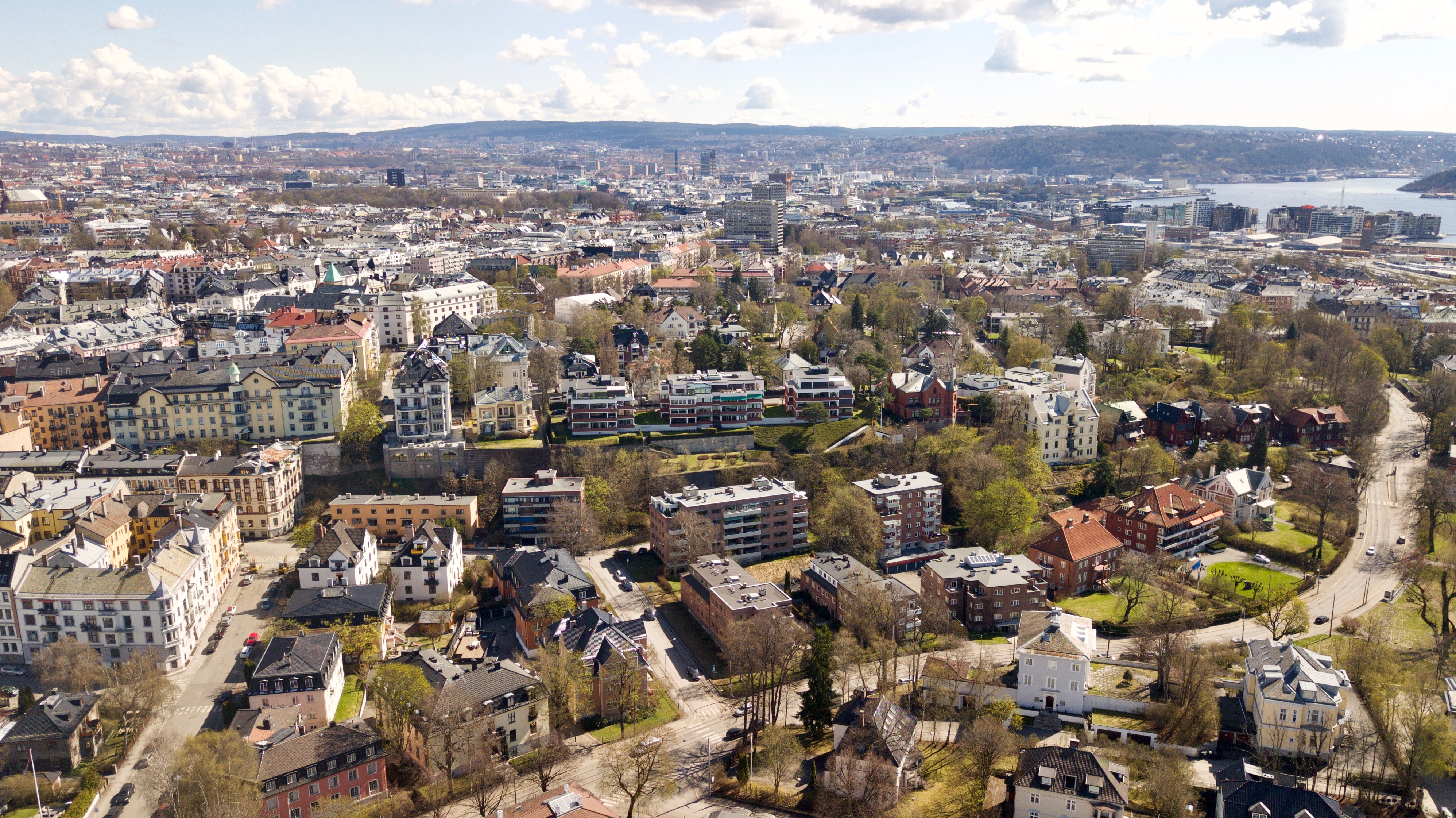 Gimle, Skarpsno. Oslo.